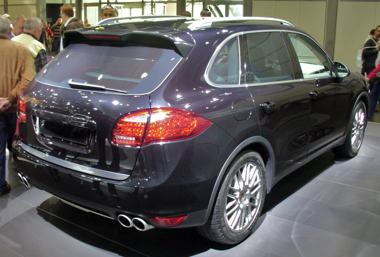 Porsche Cayenne II